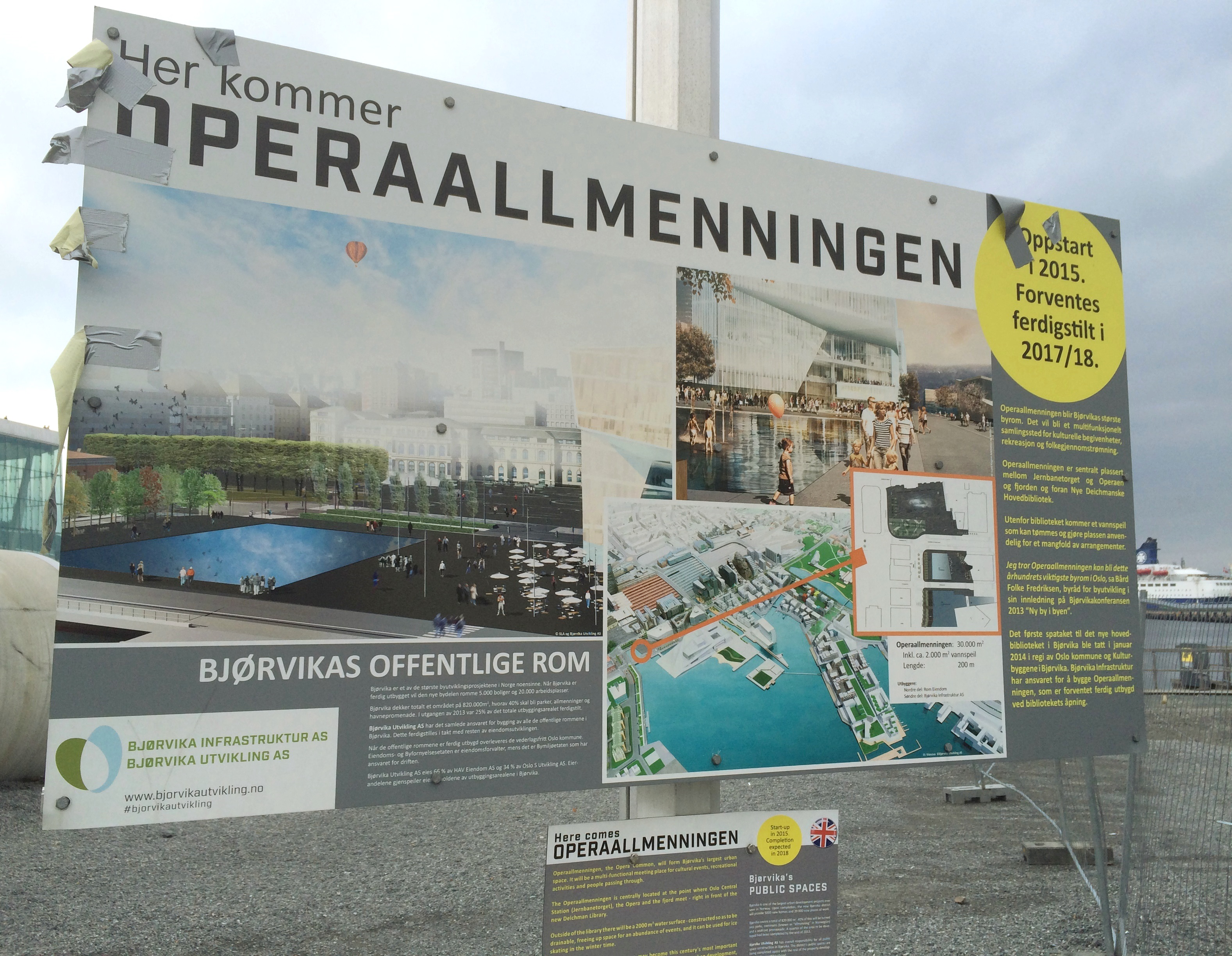 Operaallmenningen anno 2015